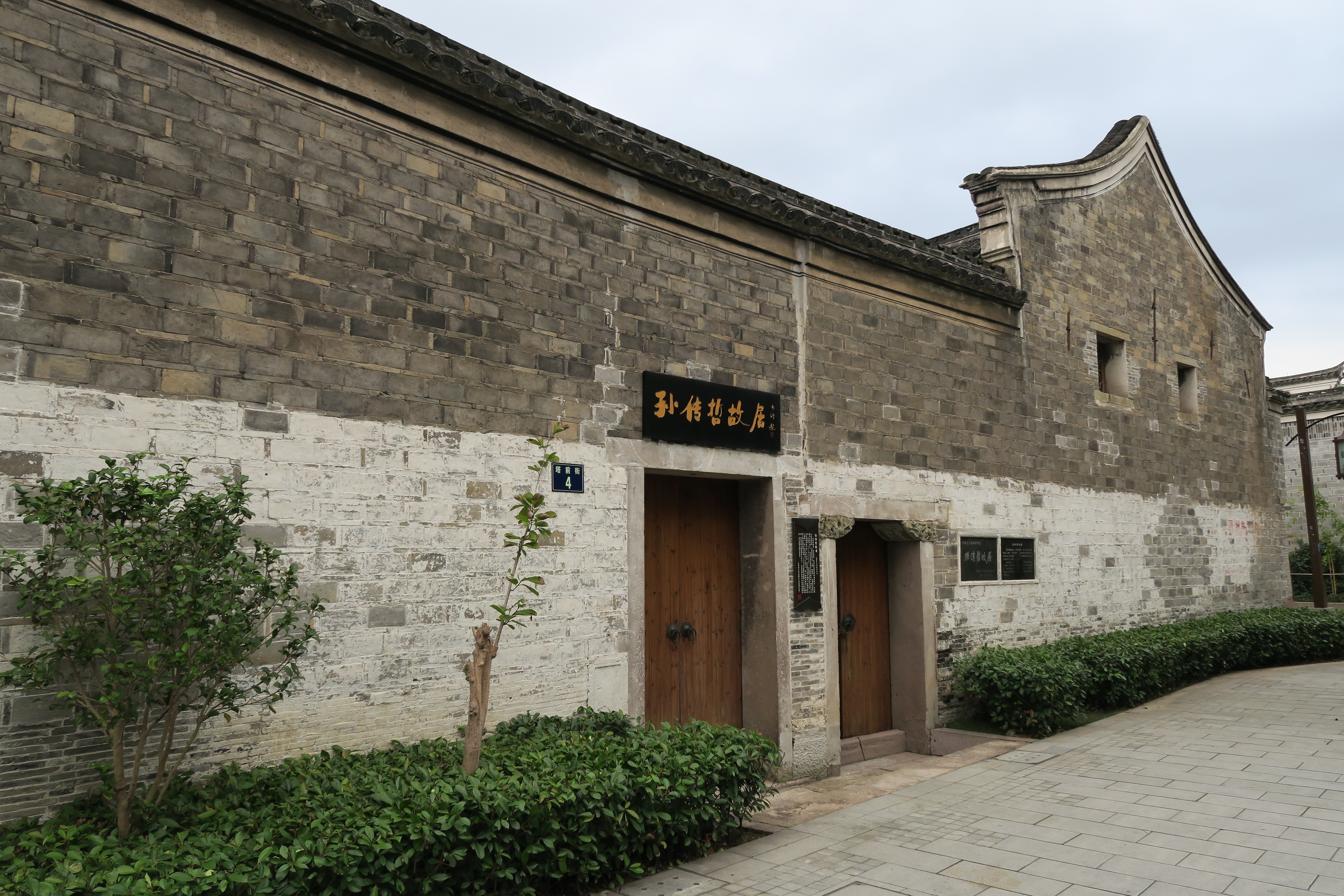 孙传哲故居